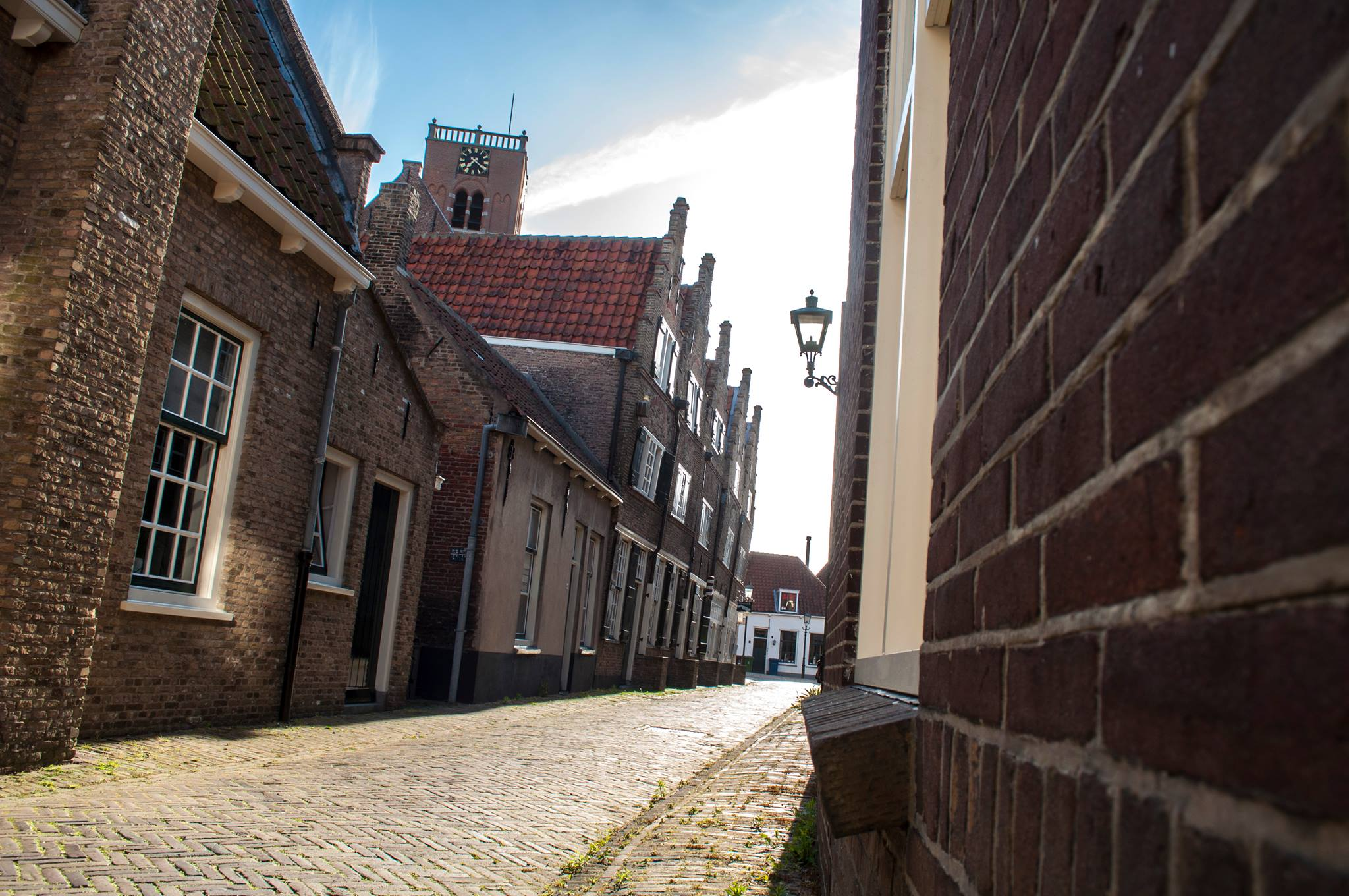 De Kerkstraat in Sommelsdijk met links de pandjes waarin het Streekmuseum Goeree-Overflakkee is gevestigd.